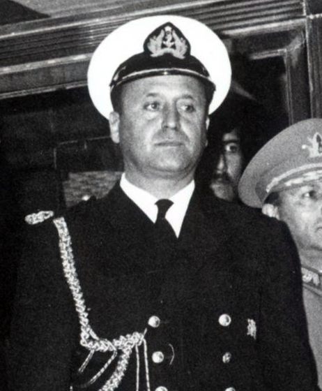 El Capitán de Navío Arturo Araya Peeters (ca. 1926,nota 2​2​ — 27 de julio de 1973) fue un marino chileno, edecán del presidente de Chile Salvador Allende. Asesinado a balazos el 27 de julio de 1973 por miembros del grupo de extrema derecha "Patria y Libertad".